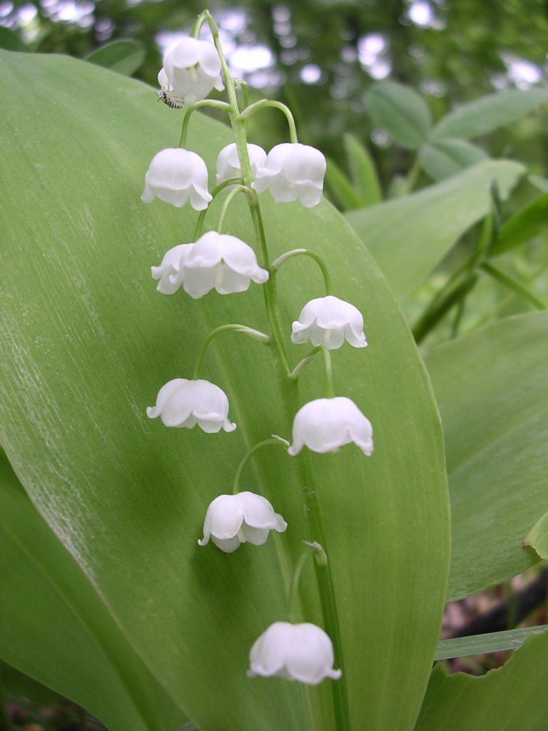 Convallaria